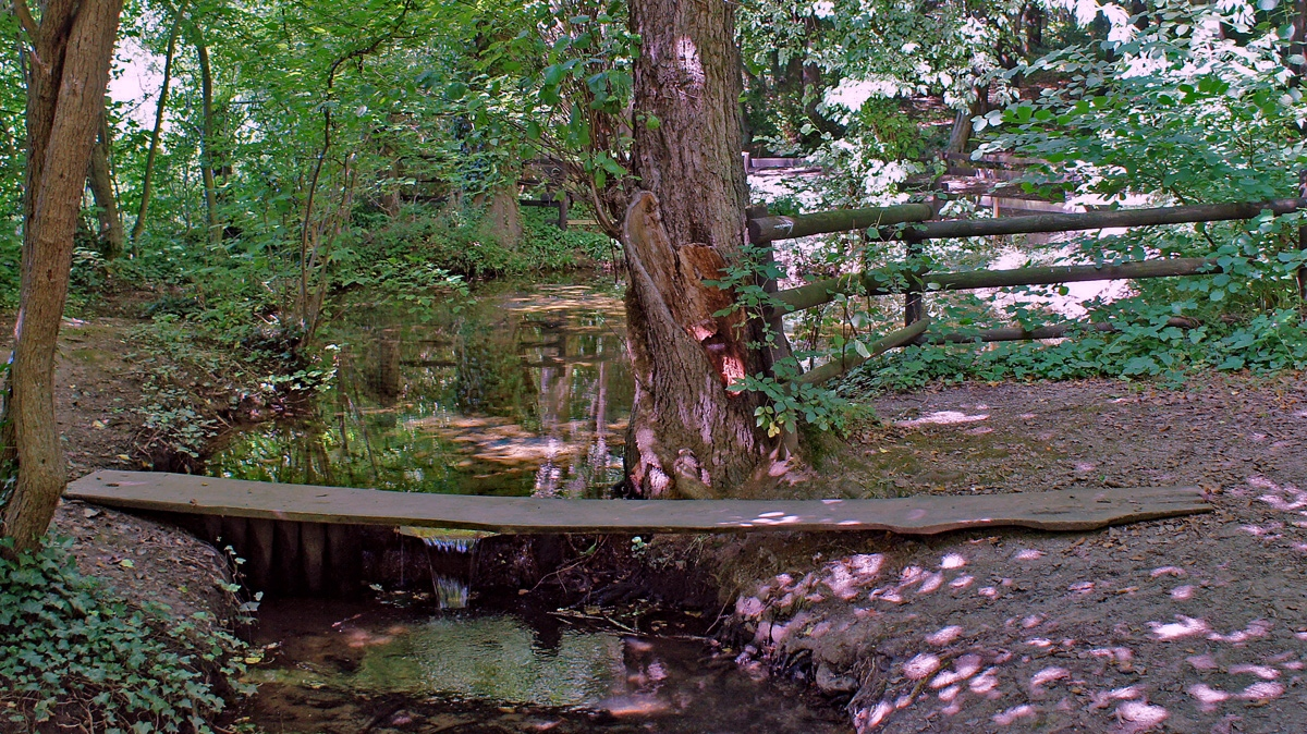 Der sogenannte "heilige" Pütz. Heilig bedeutet allerdings Hügel, Pütz ist die Quelle. In römischer Zeit begann hier eine Wasserleitung quer durch die Drover Heide. Der Quelltopf war gefasst, wovon heute nicts mehr zu sehen ist.